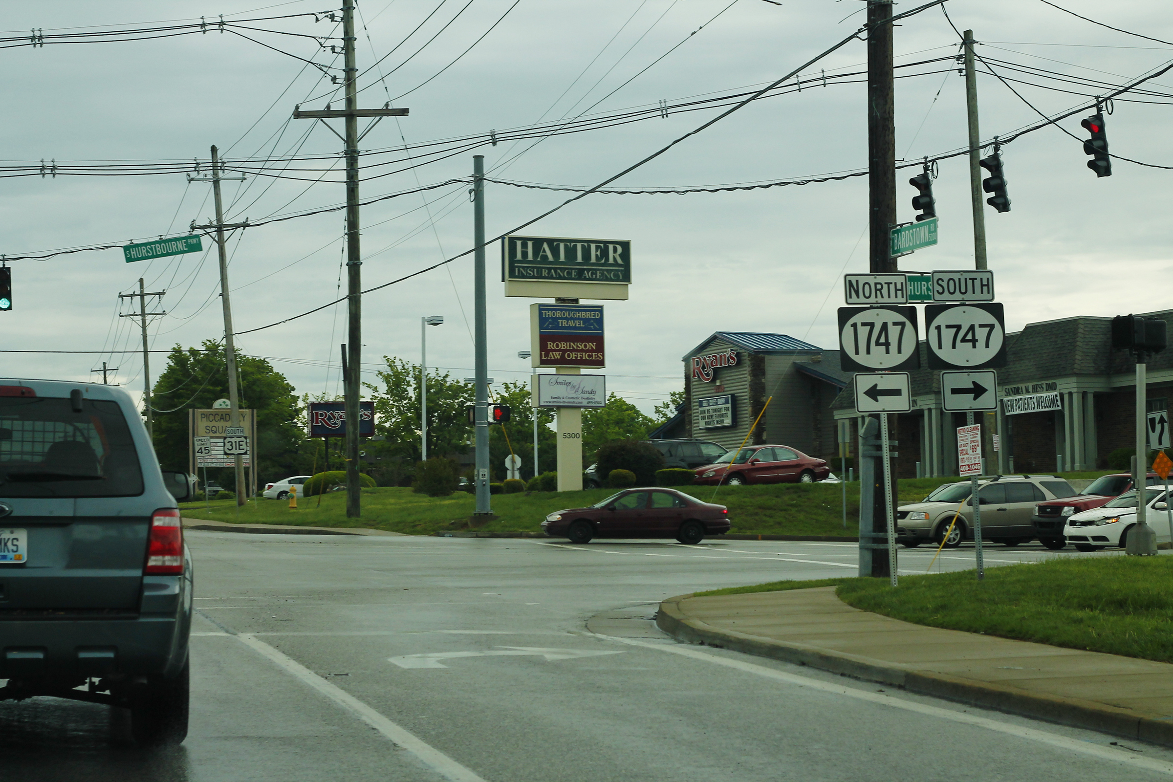 US31EsUS150sRoad-KY1747nsSigns